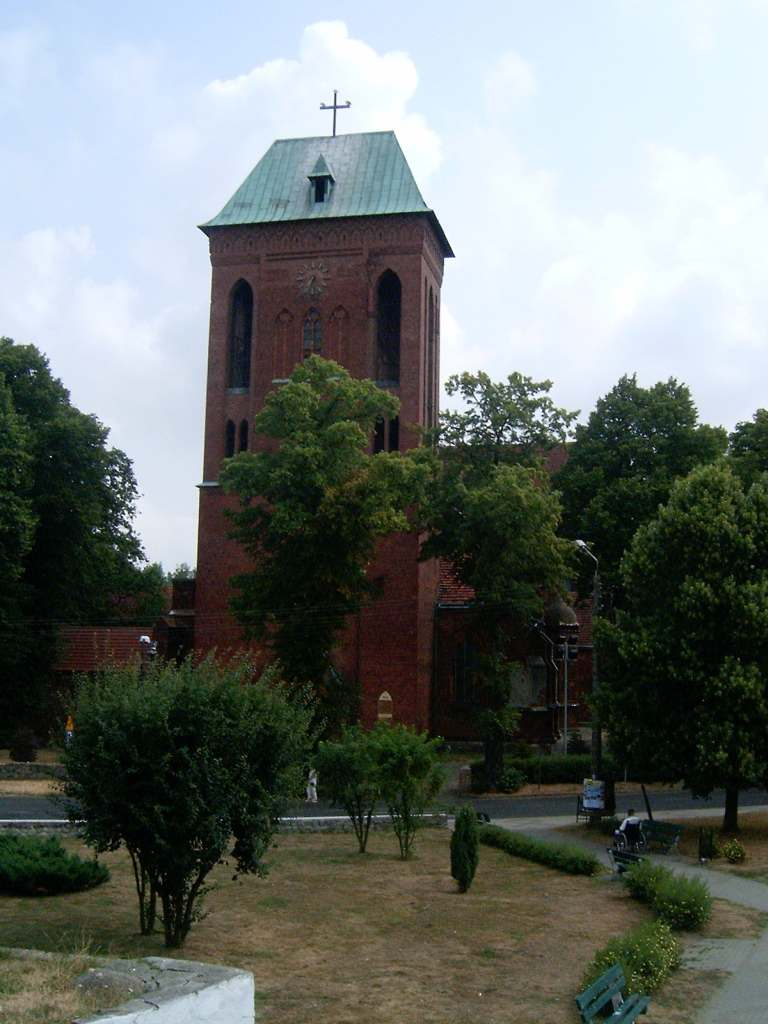 Kamień Pomorski - Katedra